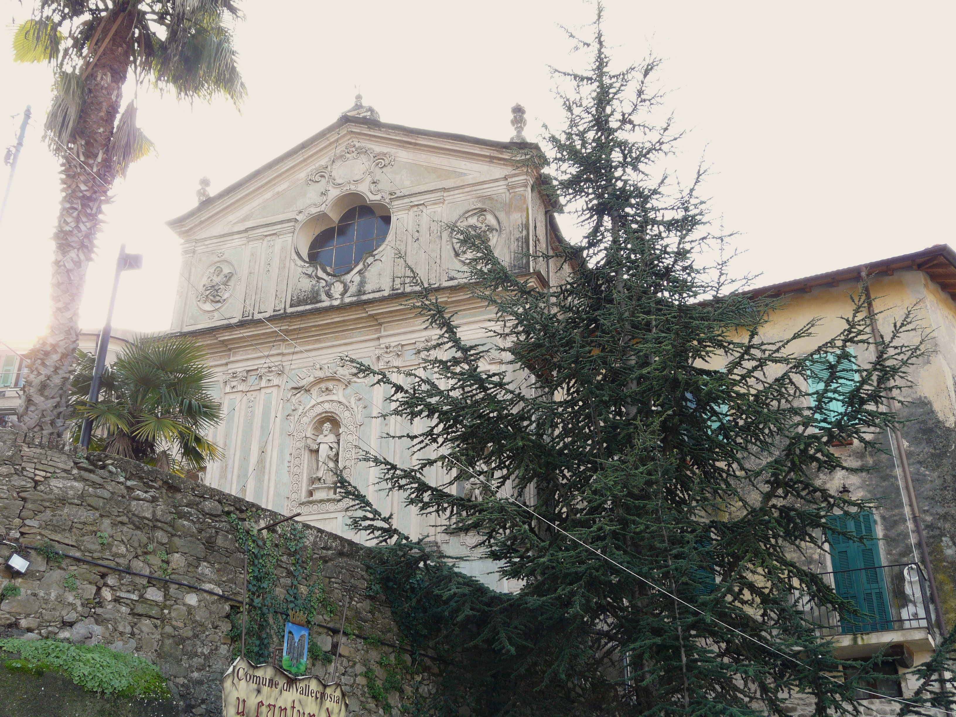 Chiesa di Sant'Antonio Abate, Vallecrosia Alta, Vallecrosia, Liguria, Italia